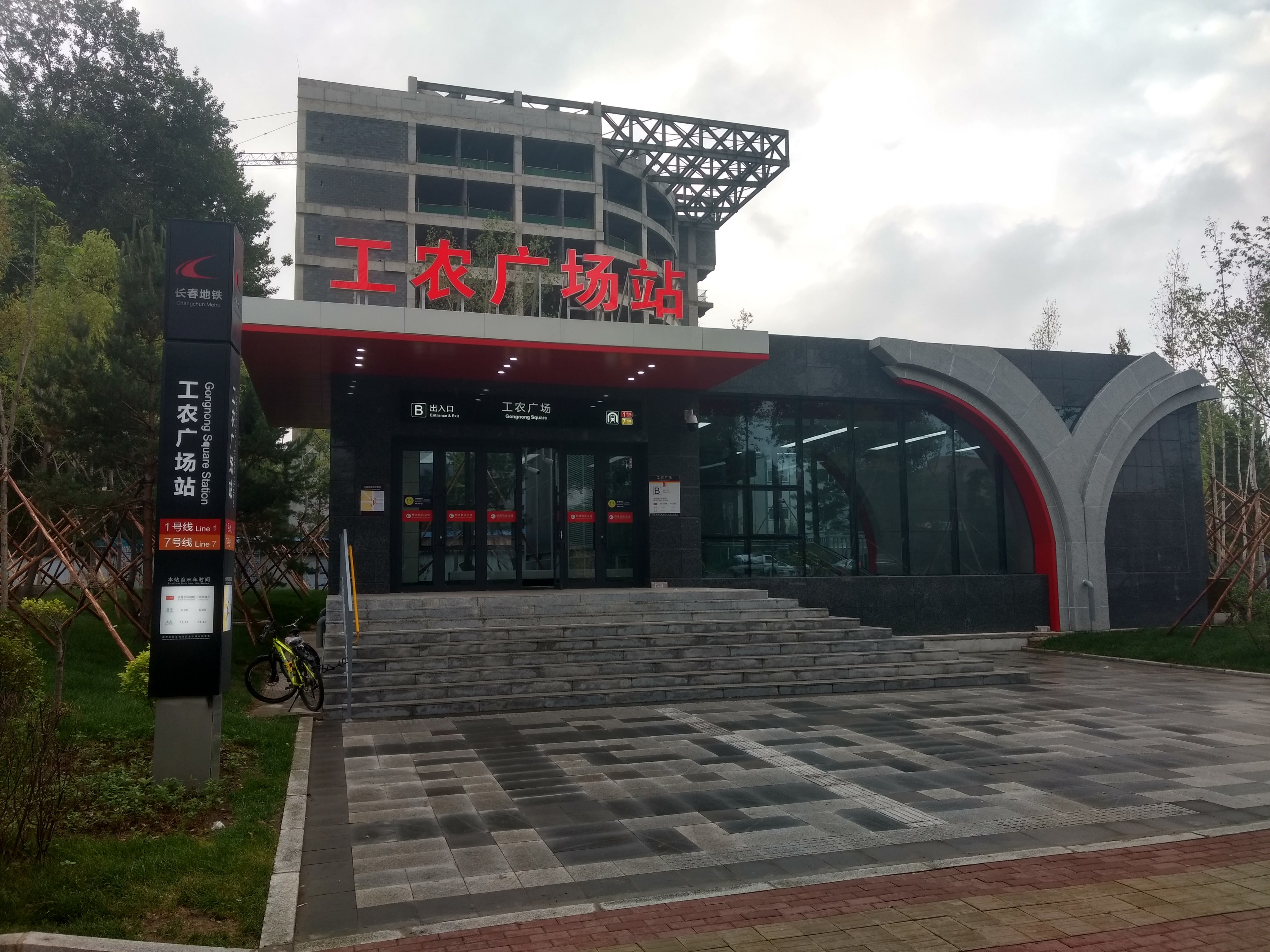 Estació de Metro de la Gongnongguangchang, Plaça dels treballadors, línies 1 i 7 del Metro de Changchun.